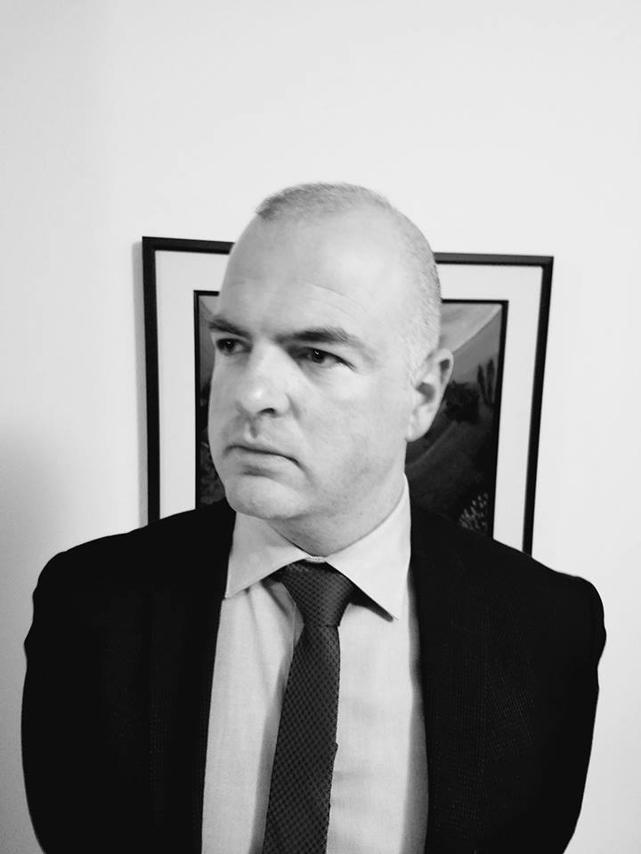 Loer Kume në 2016